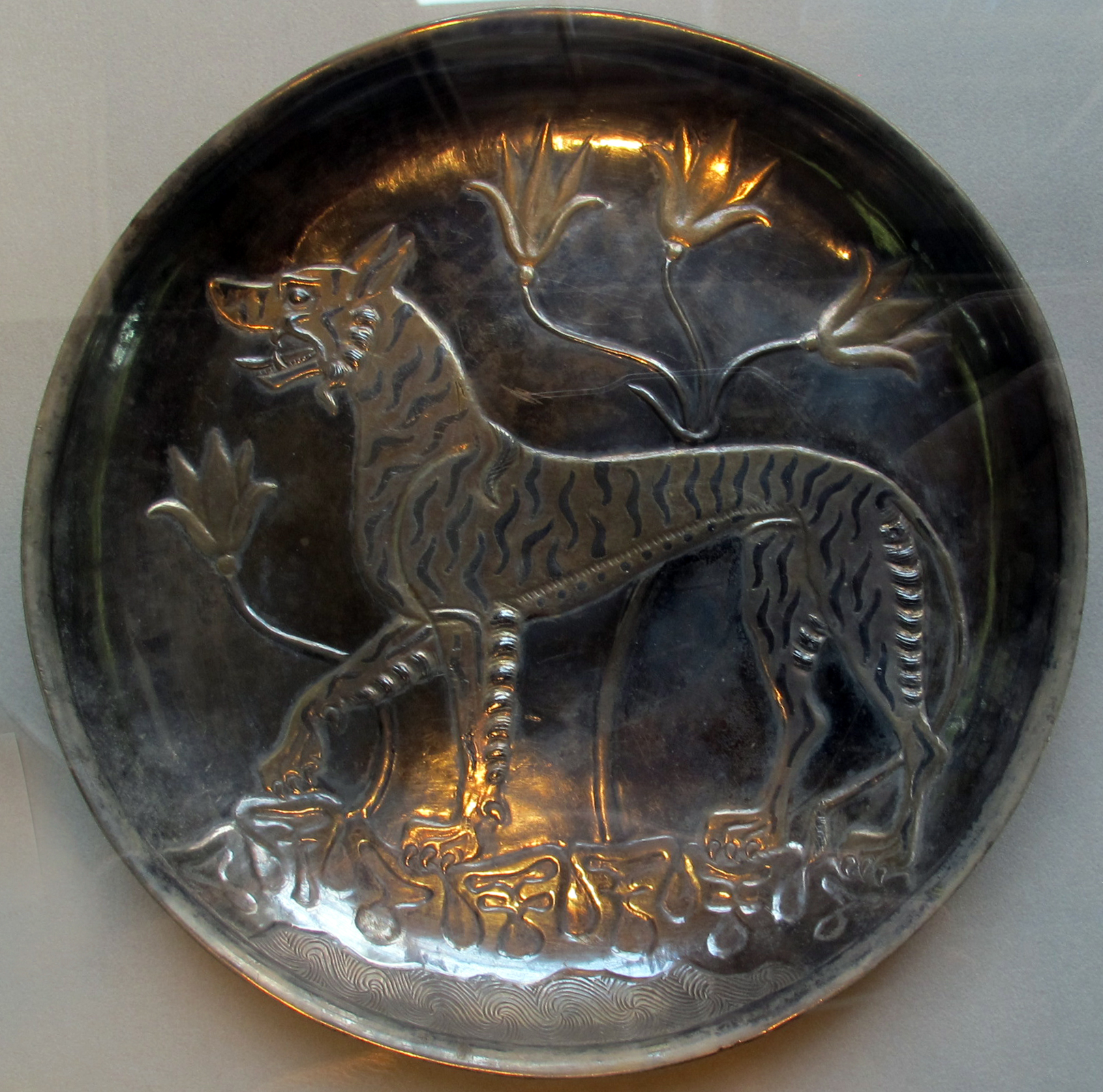 Sogdiana, piatto con tigre, argento dorato e niellato, VII-VIII sec